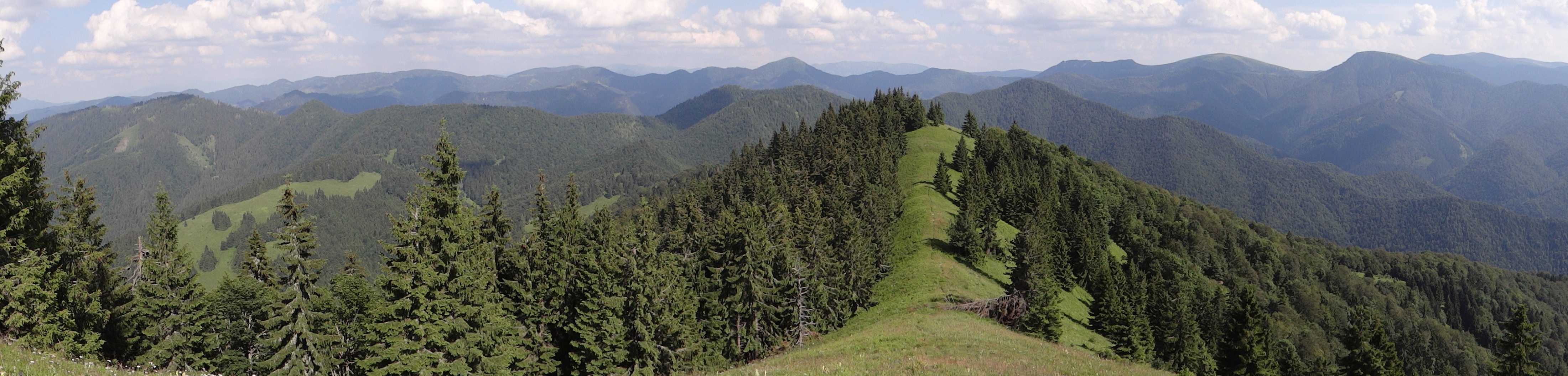 Lysec - panorama